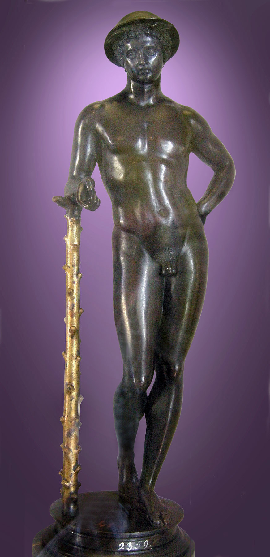 Mercúrio